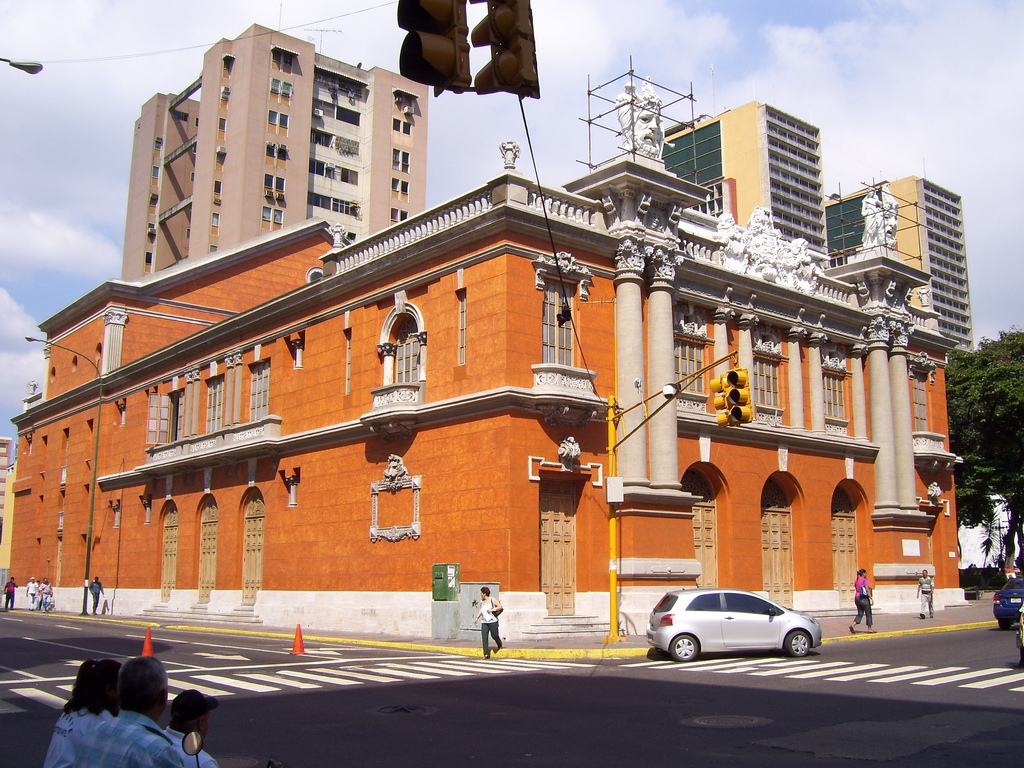 Restauración Teatro Nacional